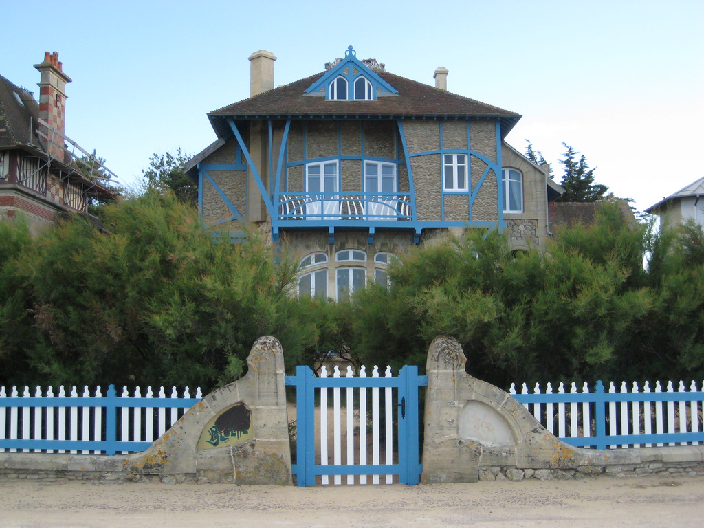 La Bluette, villa construite à Hermanville-sur-mer en 1899 par Hector Guimard pour Prosper Grivellé, avocat à Paris. Elle est classée monument historique depuis 2005.